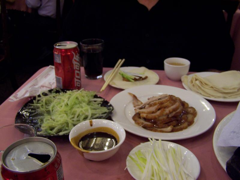 Peking Duck (Beijing Duck). Beijing